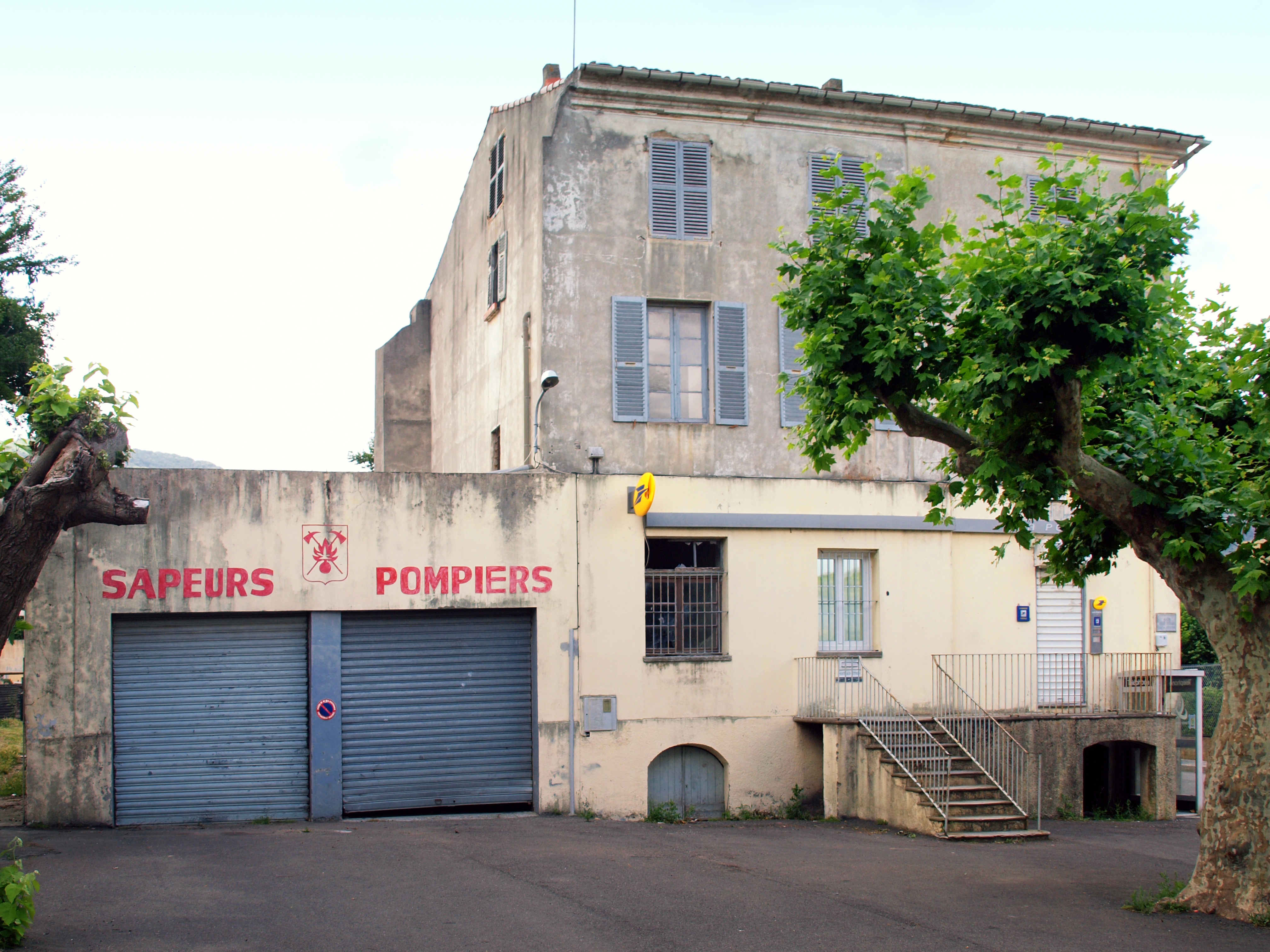 Luri (Corse) - L'ancienne caserne des pompiers et l'agence postale à Piazza